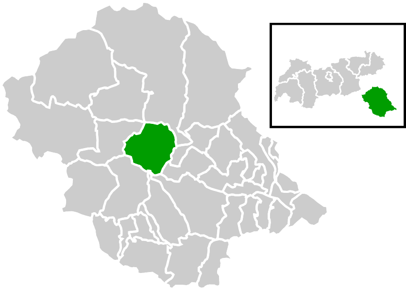 Lage der Gemeinde innerhalb des Bezirks Lienz